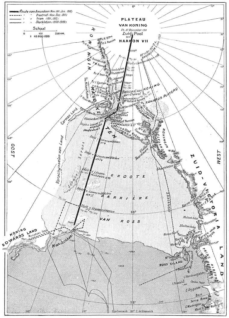 Aan de Zuidpool